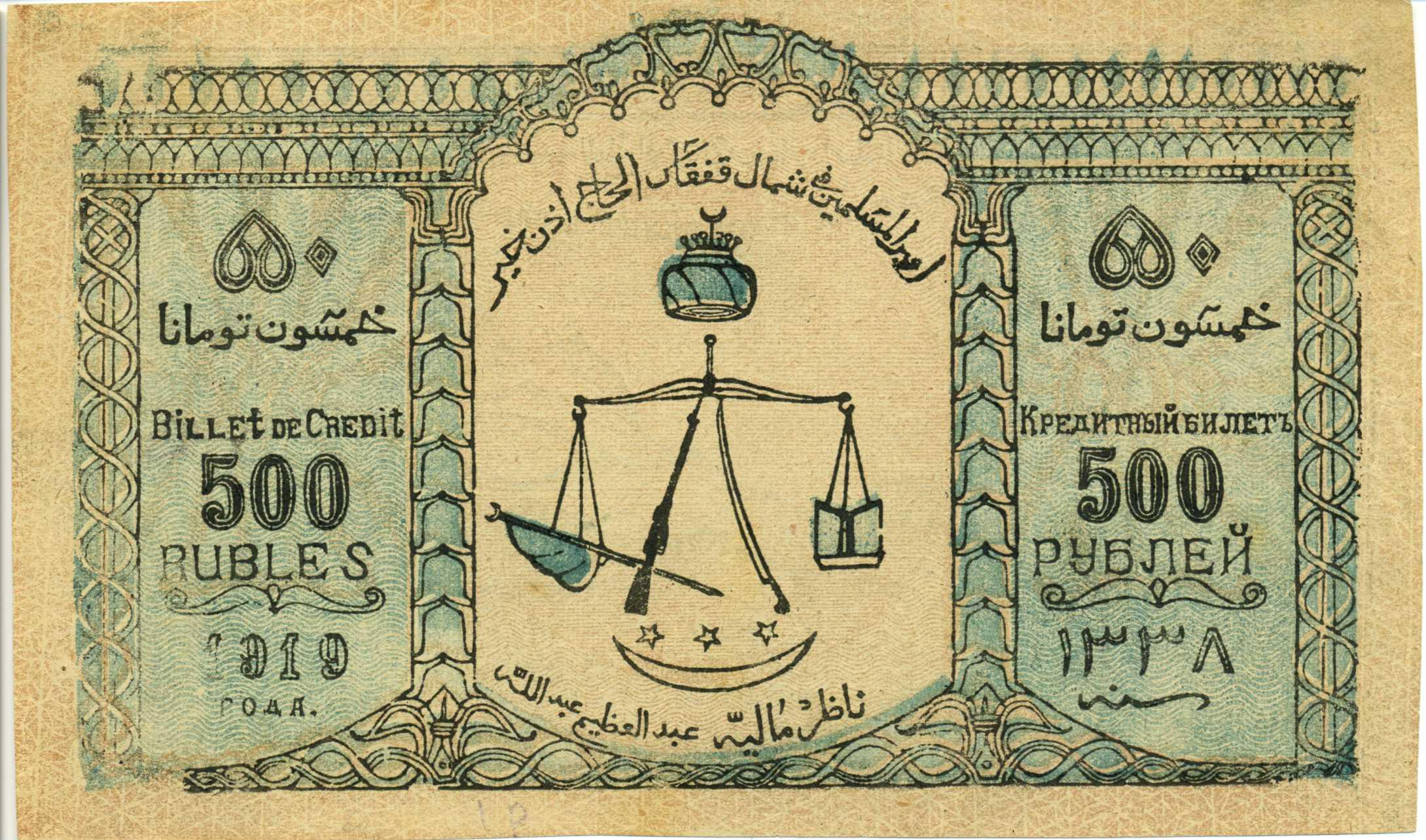 50 туманов Северо-Кавказского эмирата (500 рублей) аверс